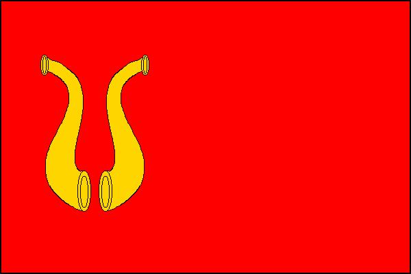 Vlajka obce Hodice